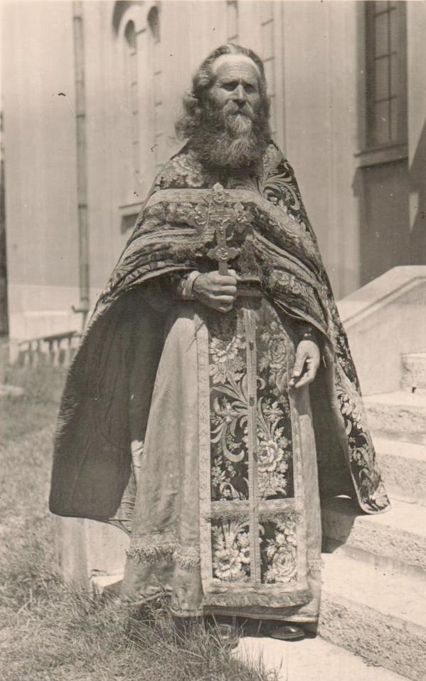 Поп Флоро Георгиев Чортанов - поп Чортан